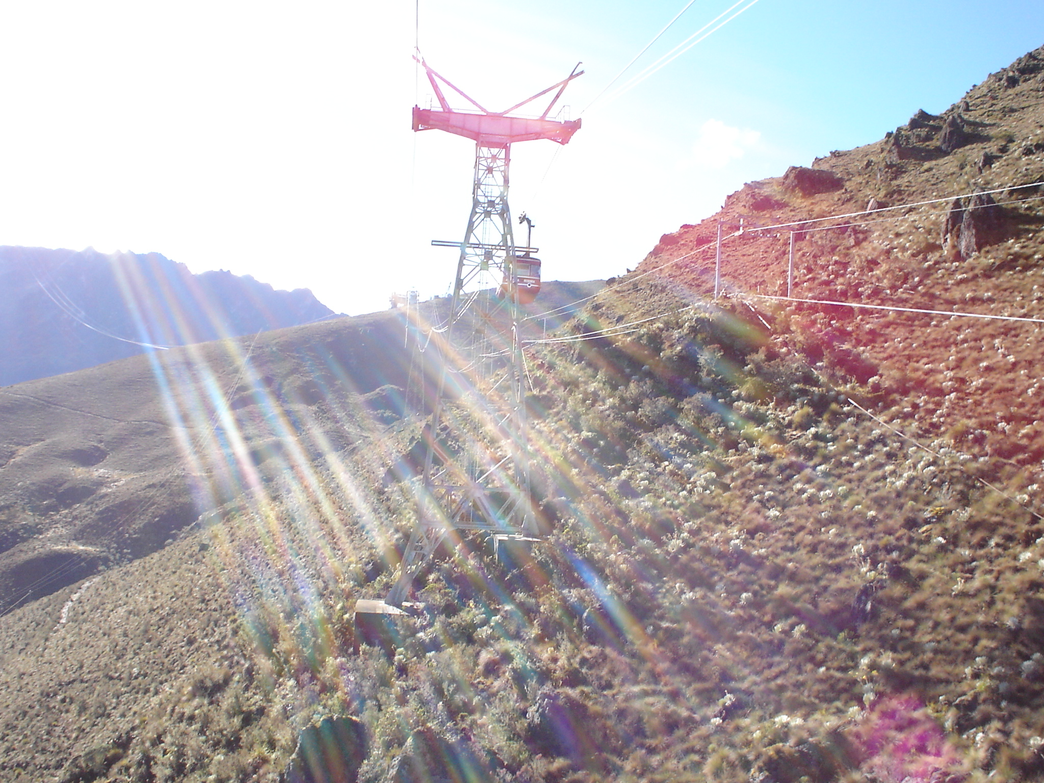 Torres del Sistema Teleferico de Mérida, entre el tramo La Aguada - Loma Redonda, Mérida, Venezuela